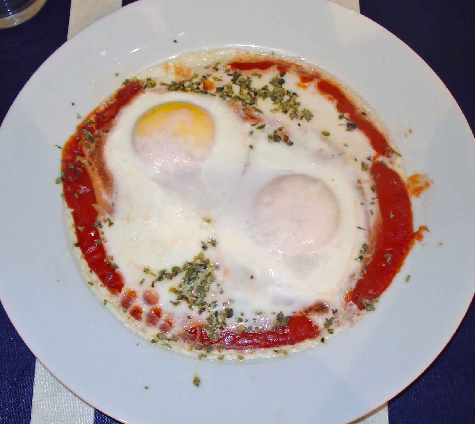 Huevos al plato(eggs & tomato)